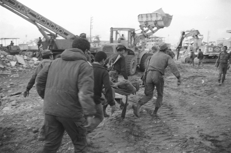 אסון צור הראשון- פינוי נפגעים, פינוי הריסות מבניין הממשל הצבאי בצור שבלבנון באמצעות עגורן.